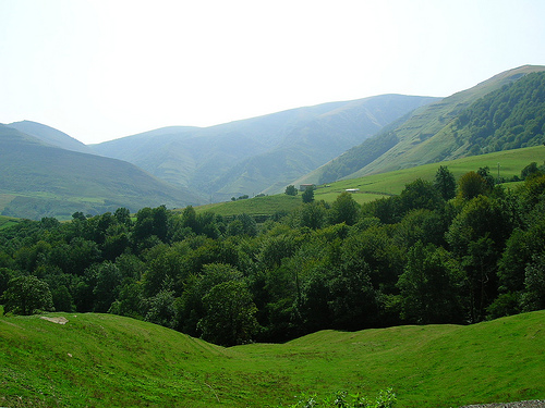 Valle de Sotoscueva1